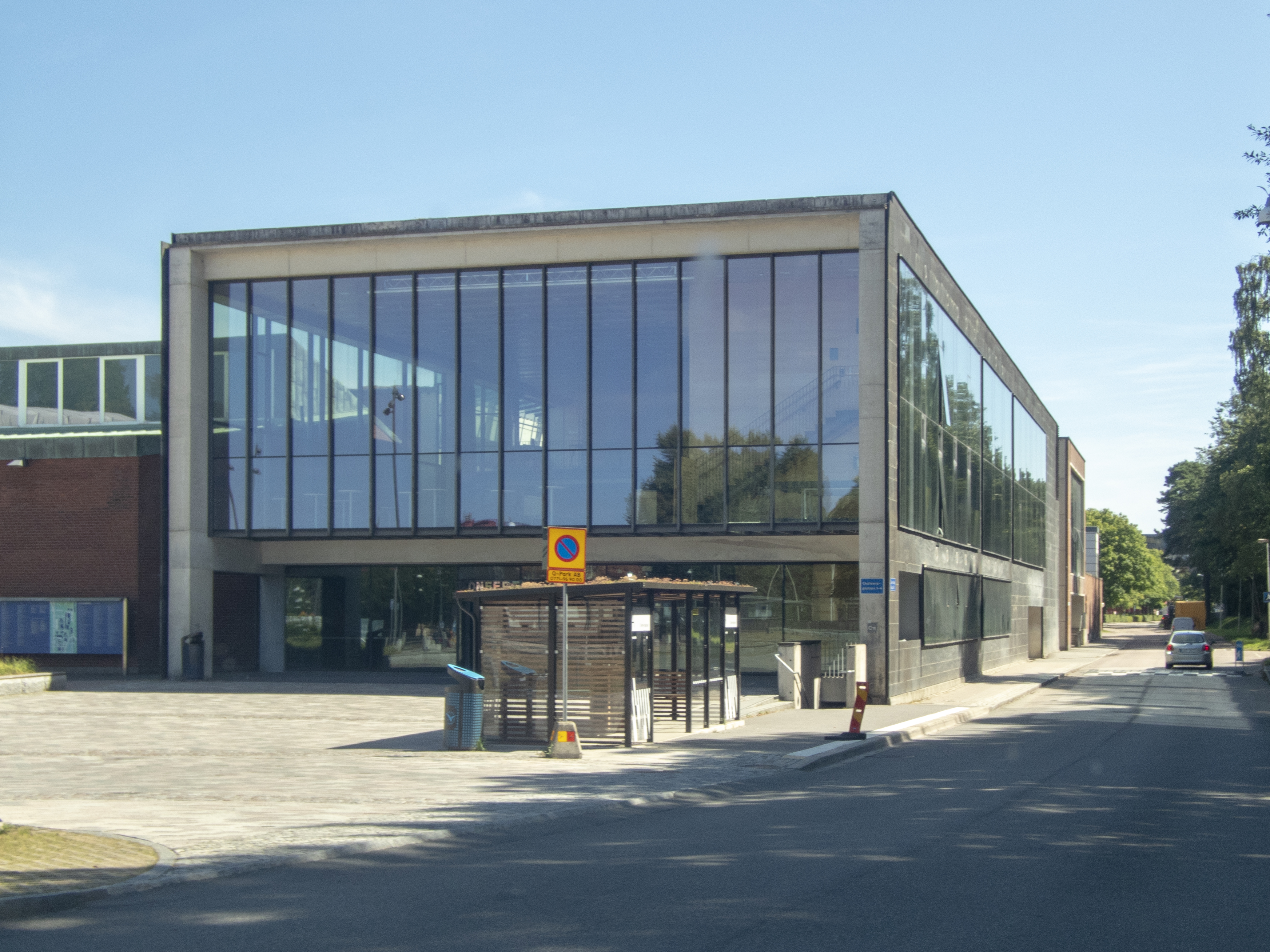 Chalmers kårhus, byggnadsår 2001. Arkitekt Gert Wingårdh